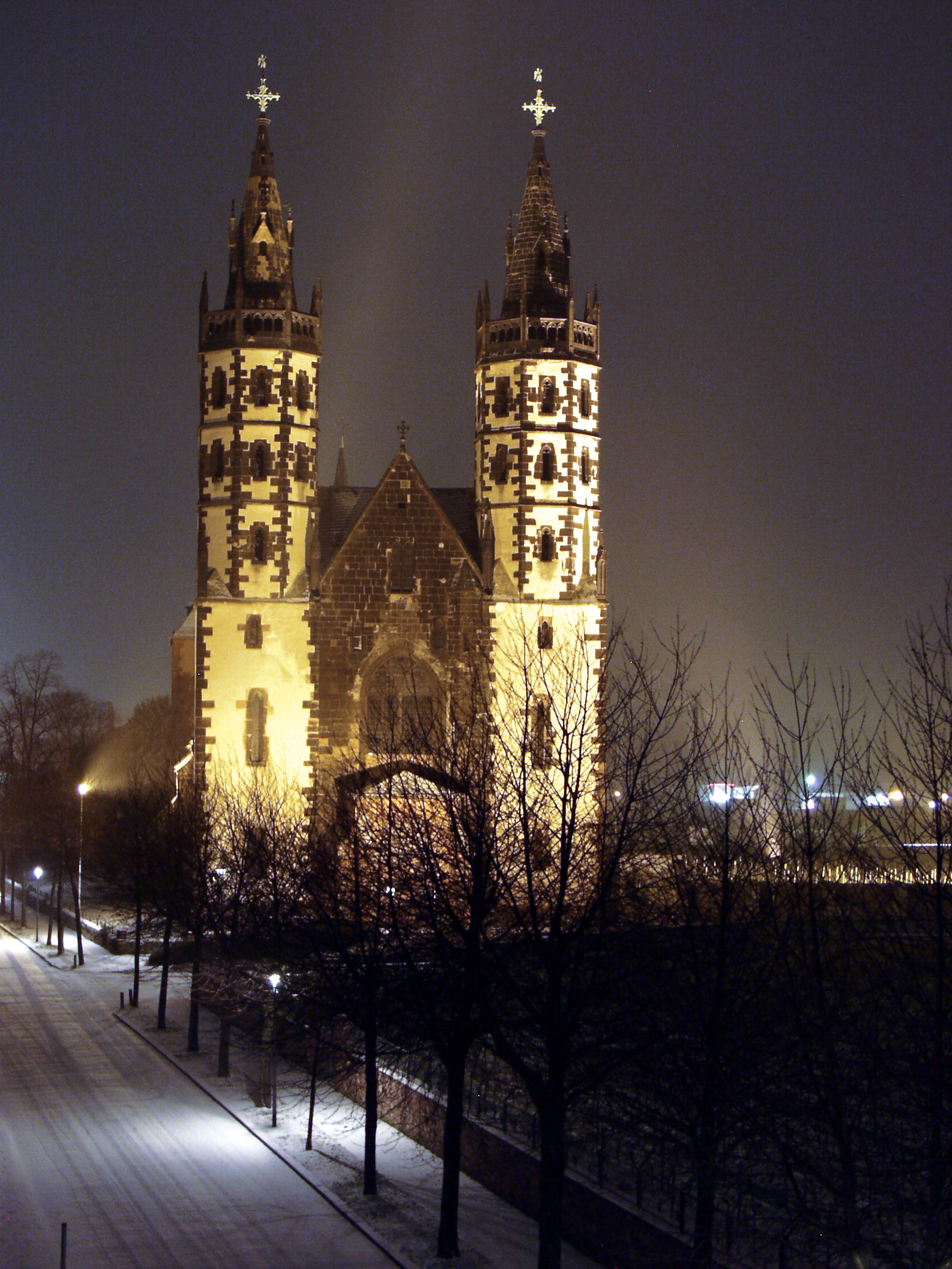 Westfassade der Liebfrauenkirche in Worms. Zustand vor der Rennovierung, 2004.